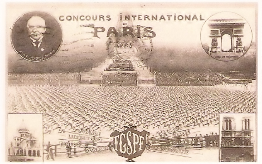 Carte postale du championnat fédéral de gymnastique de la FGSPF, Paris 1923